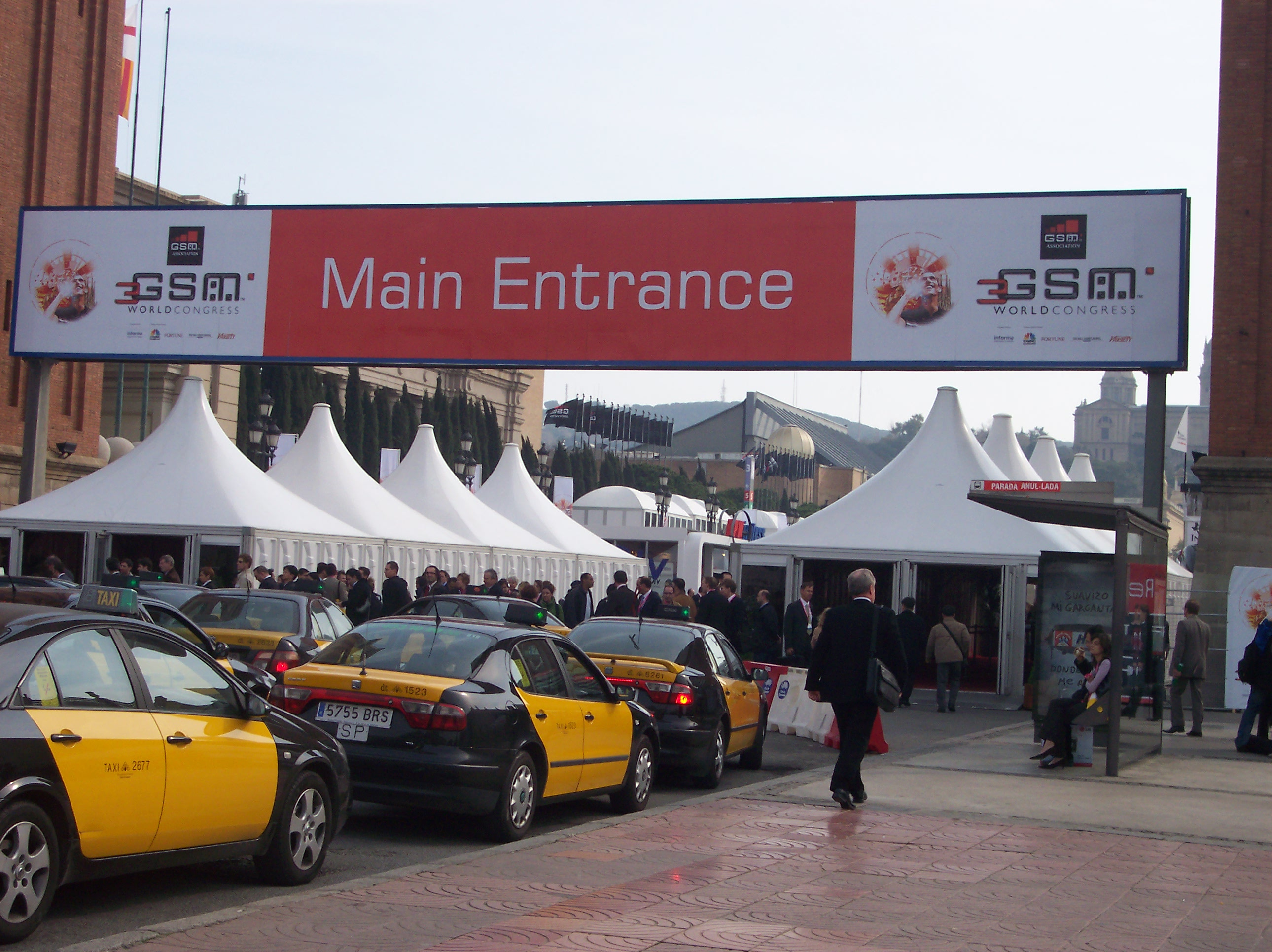 Entrada principal del 3GSM World Congress